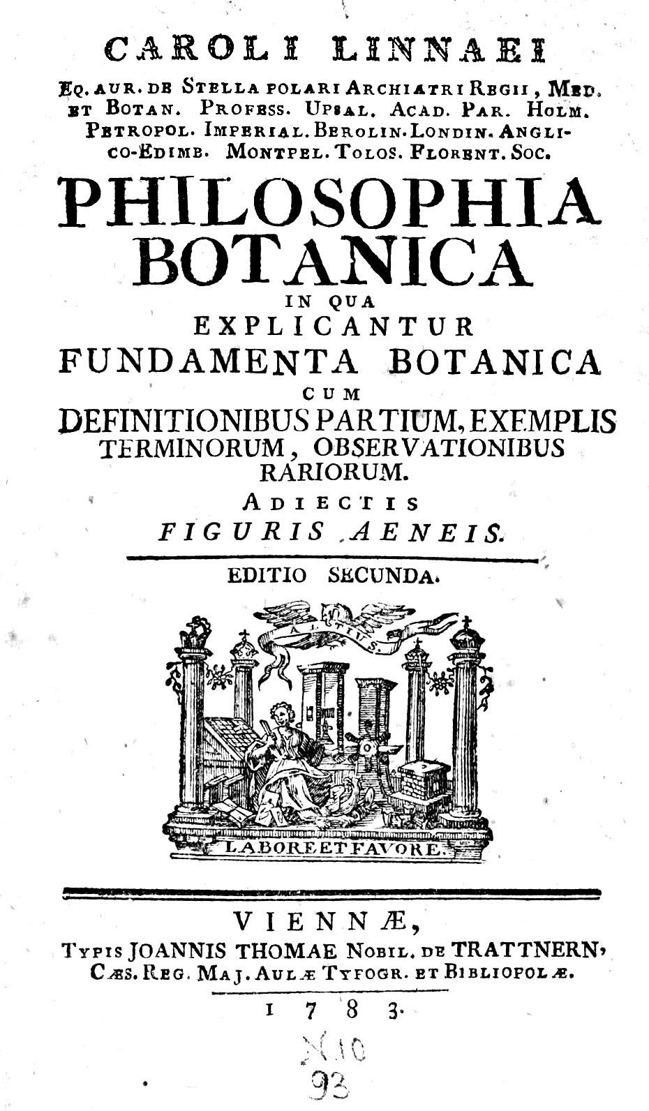 Titelblatt der 2. Auflage (1783) von Philosophia Botanica von Carl von Linné